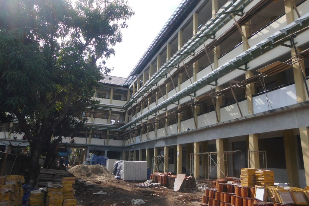 Foto ini diambil dari data sekolah